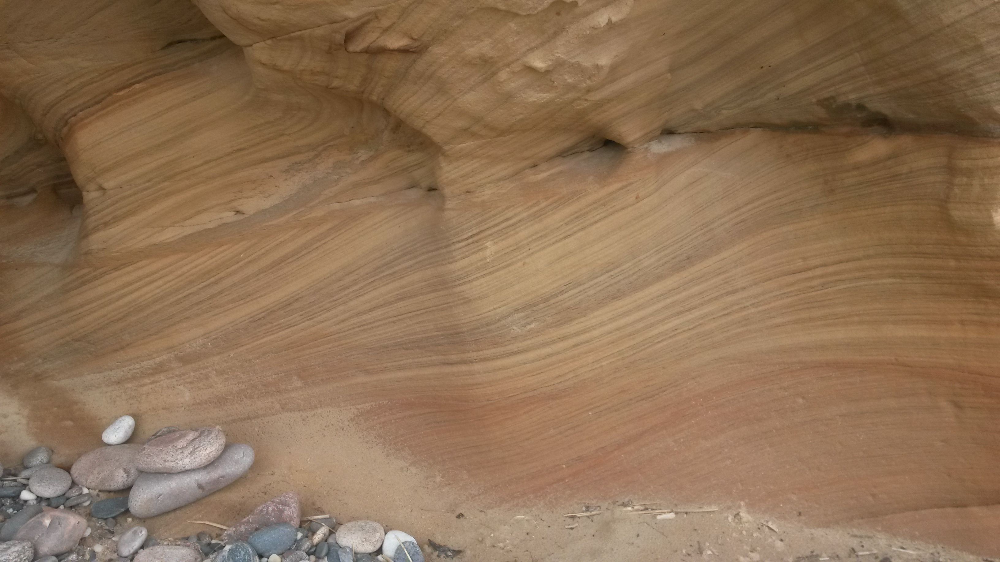 Veczemju klintis - smilšakmens